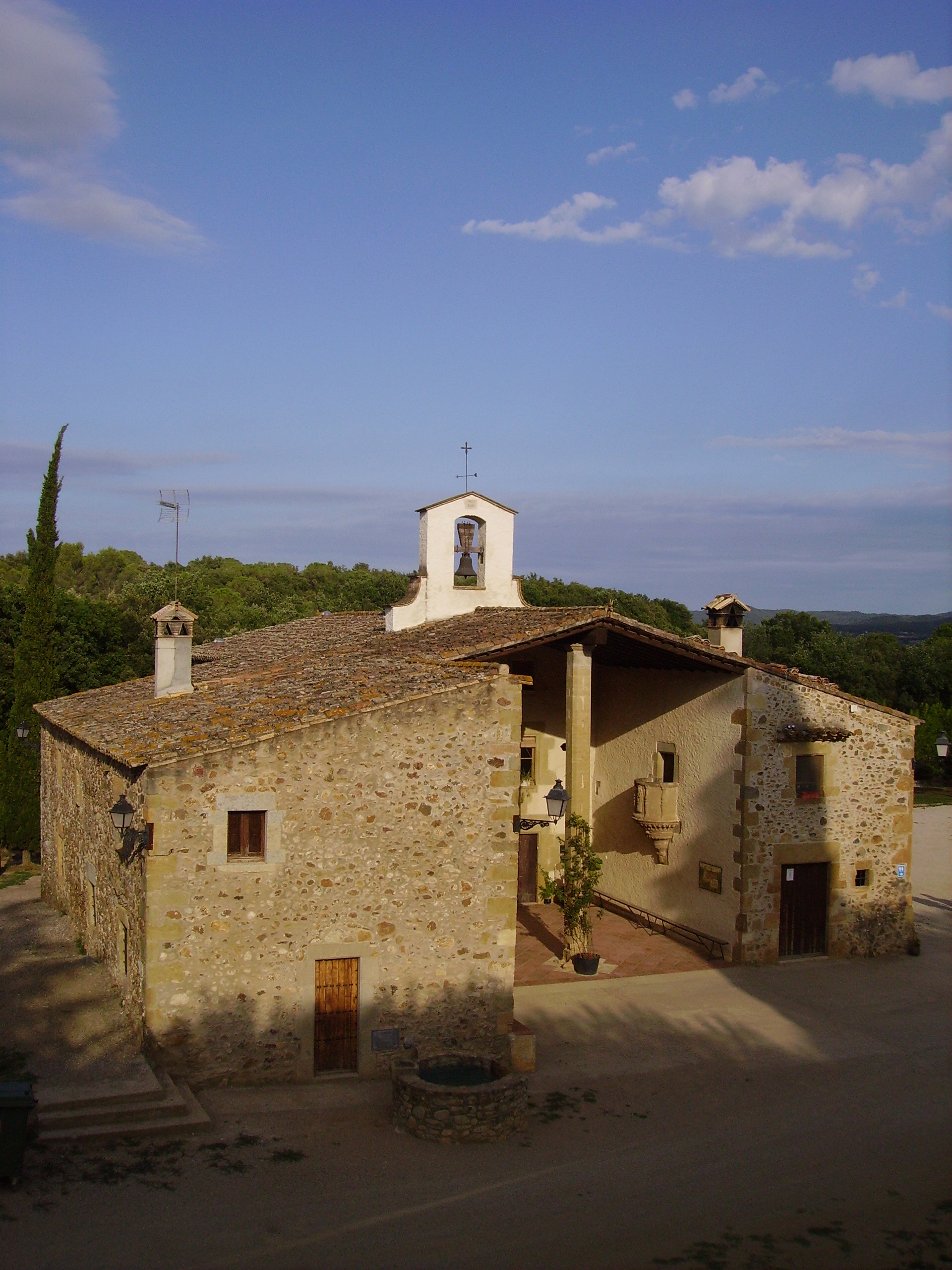 Mare de Déu de l'Esperança (Cruïlles, Baix Empordà)